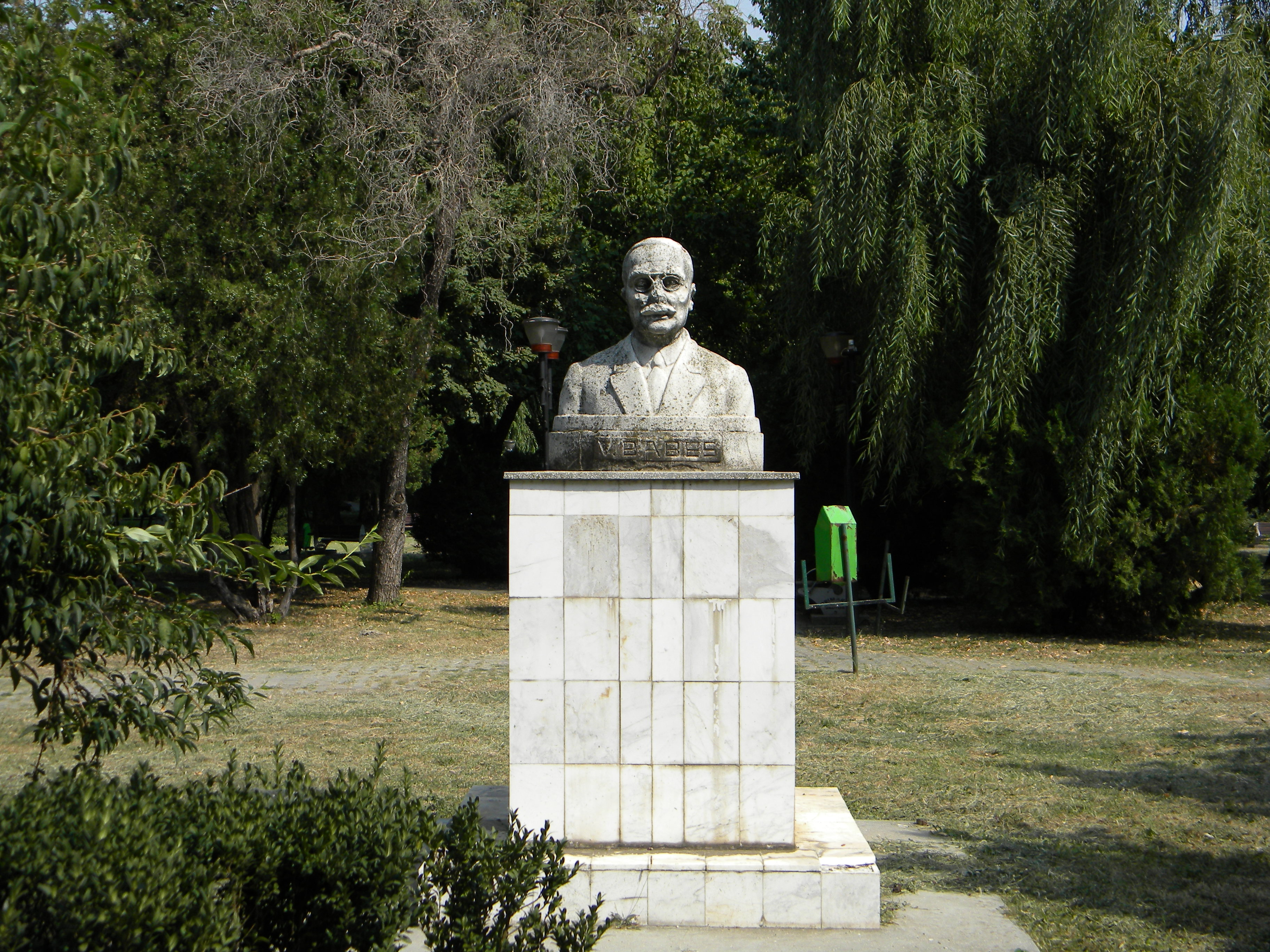 Statuia Prof. Dr. Victor Babes din curtea Universitatii de Medicina si Farmacie, Bucuresti